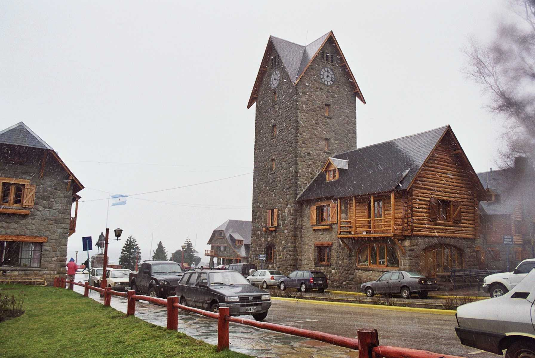 Centro Cívico, Bariloche (Argentina)